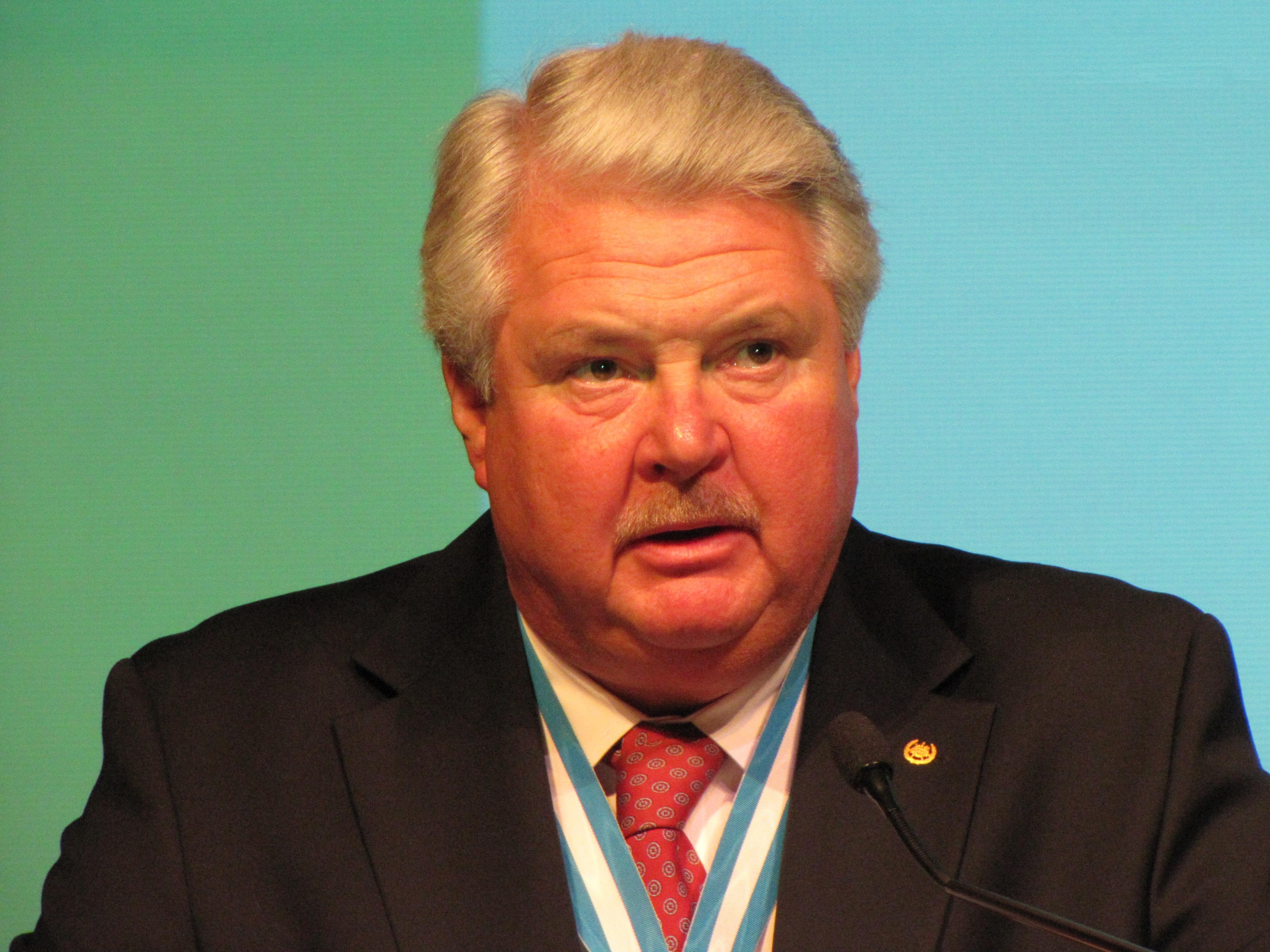 Bjarne Holmqvist, tidigare VD för Gunnebo.